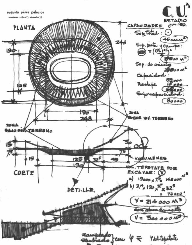 Croquis conceptual de la propuesta en concreto armado en González, Lourdes. "El Estadio Olímpico Universitario del Pedregal. Permanencia y vigencia", Revista Arquitectura vol. 21, UNAM, 201, pp. 34